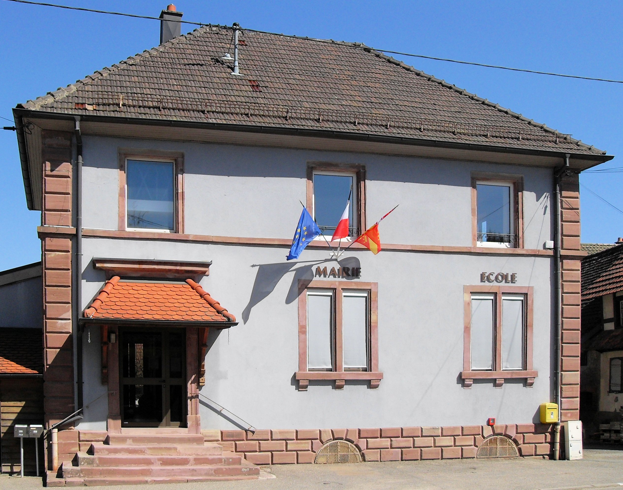 La mairie-école de Mortzwiller